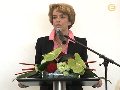 Veronika Fischer bei der Eröffnung von "Terra Verulcania" in Mayen.